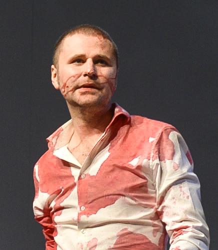 Kung Lear handlar om en makthavare som tappat greppet och hemfaller åt sin fåfänga. Rollen som Kung Lear är Sven Wollters avsked till teatern.